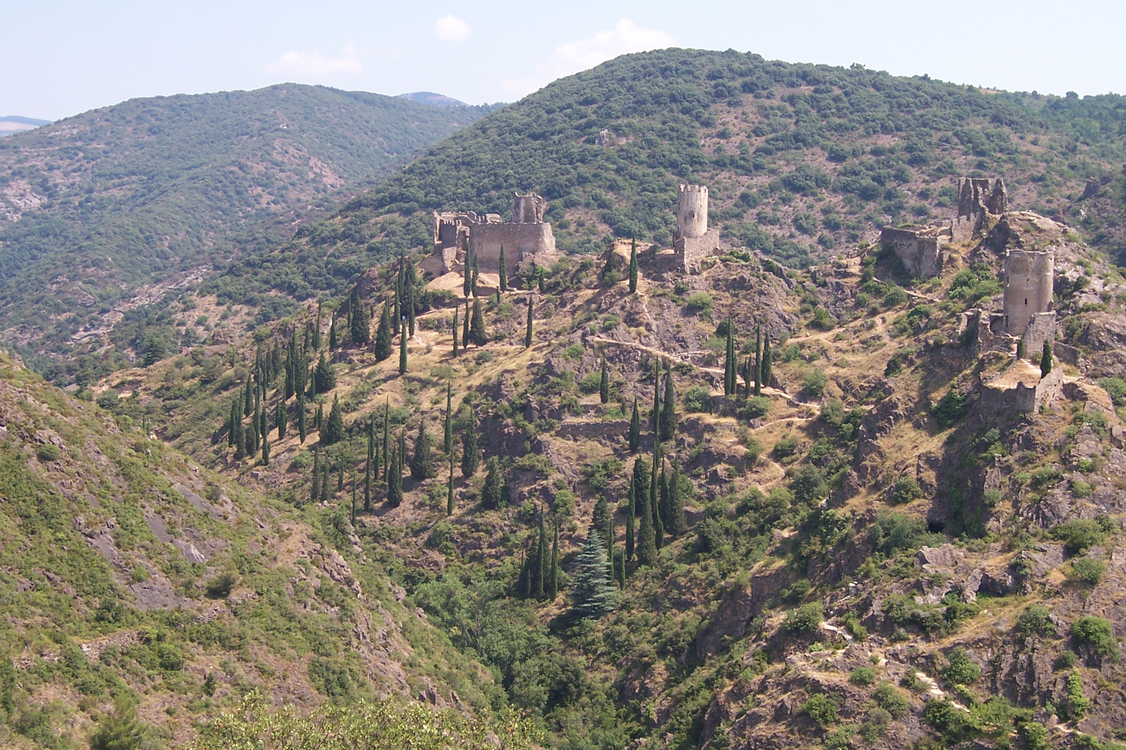 France - Aude - Châteaux de Lastours